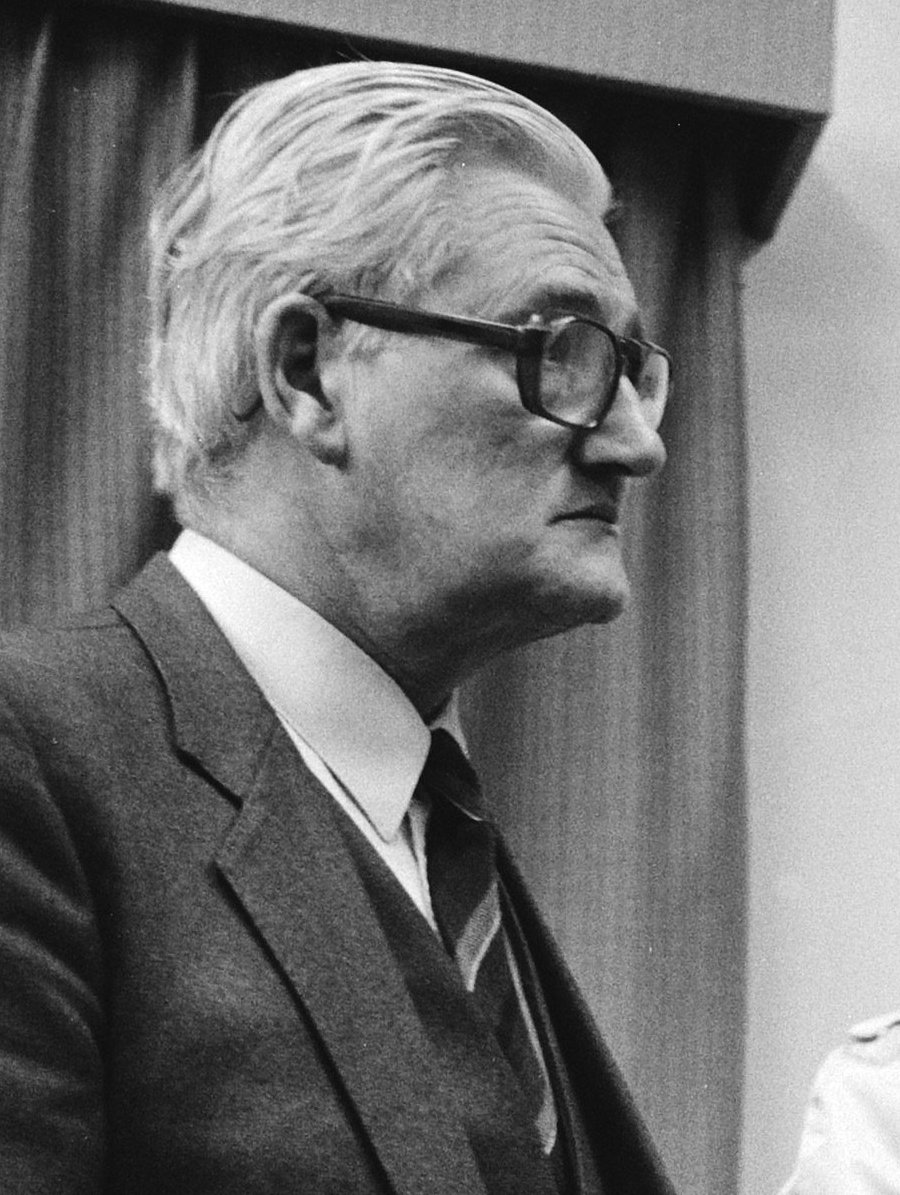 Burgemeester Zeeuw (l) in gesprek met buurtbewoners die waarschijnlijk hun huis moeten verlaten, tijdens een buurtvergadering